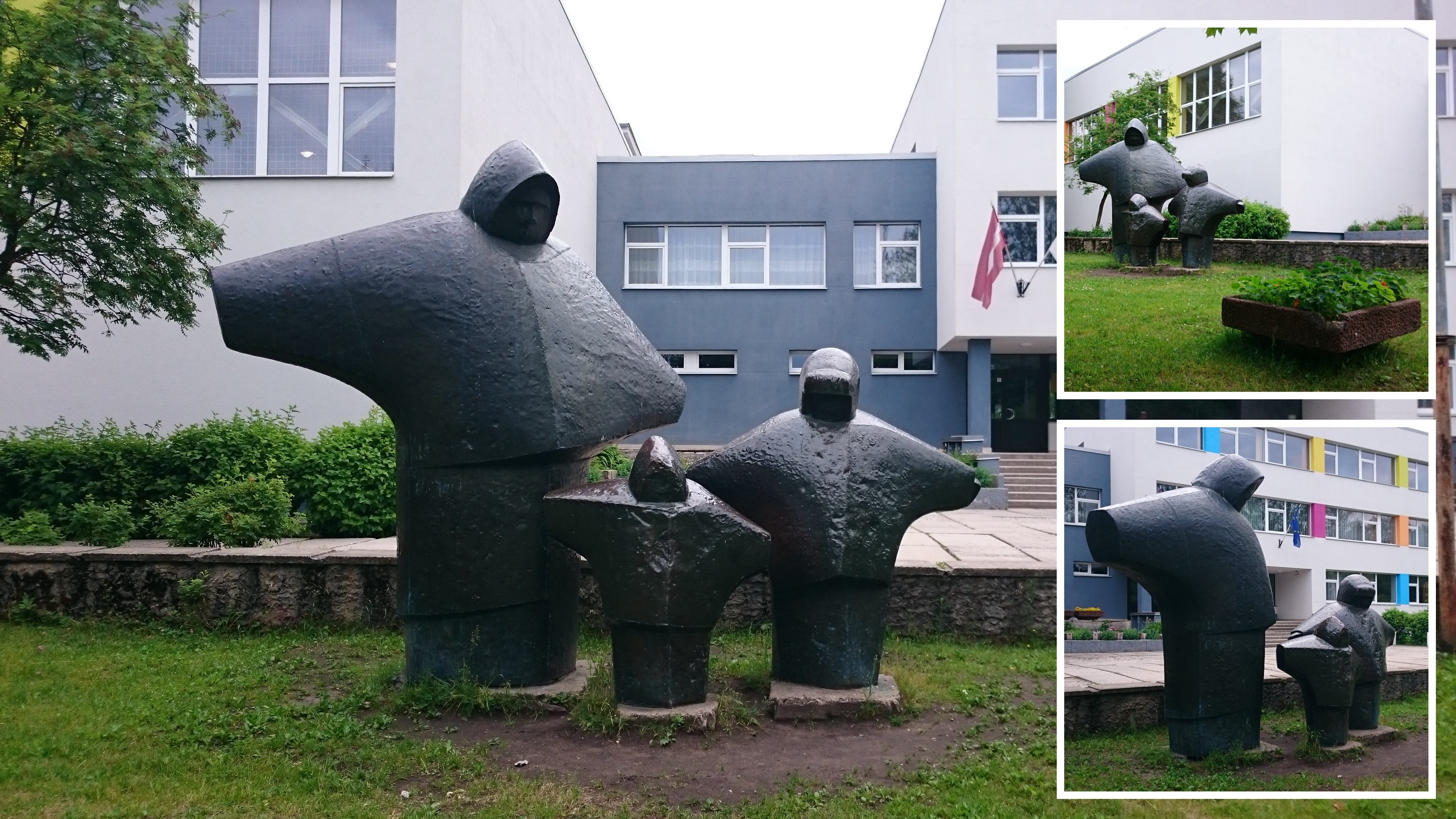 Трёх-фигурная декоративная композиция медной чеканки — образ фигуры матери и двух одетых в зимнюю одежду детей. Была установлена у здания Рижской средней школы № 86 в 1983 году. Автор — скульптор комбината декоративного искусства «Максла» Зигрида Фернау-Тищенко. Мотив сюжета родился из наблюдения за выходящими каждое утро из многоэтажных жилых домов родителями, которые, спеша на работу, по дороге отводят малышей в детский сад или в школу. (Источник: Оярс Спаритис. «Памятники и декоративная скульптура Риги», 2001. — С. 148—150)